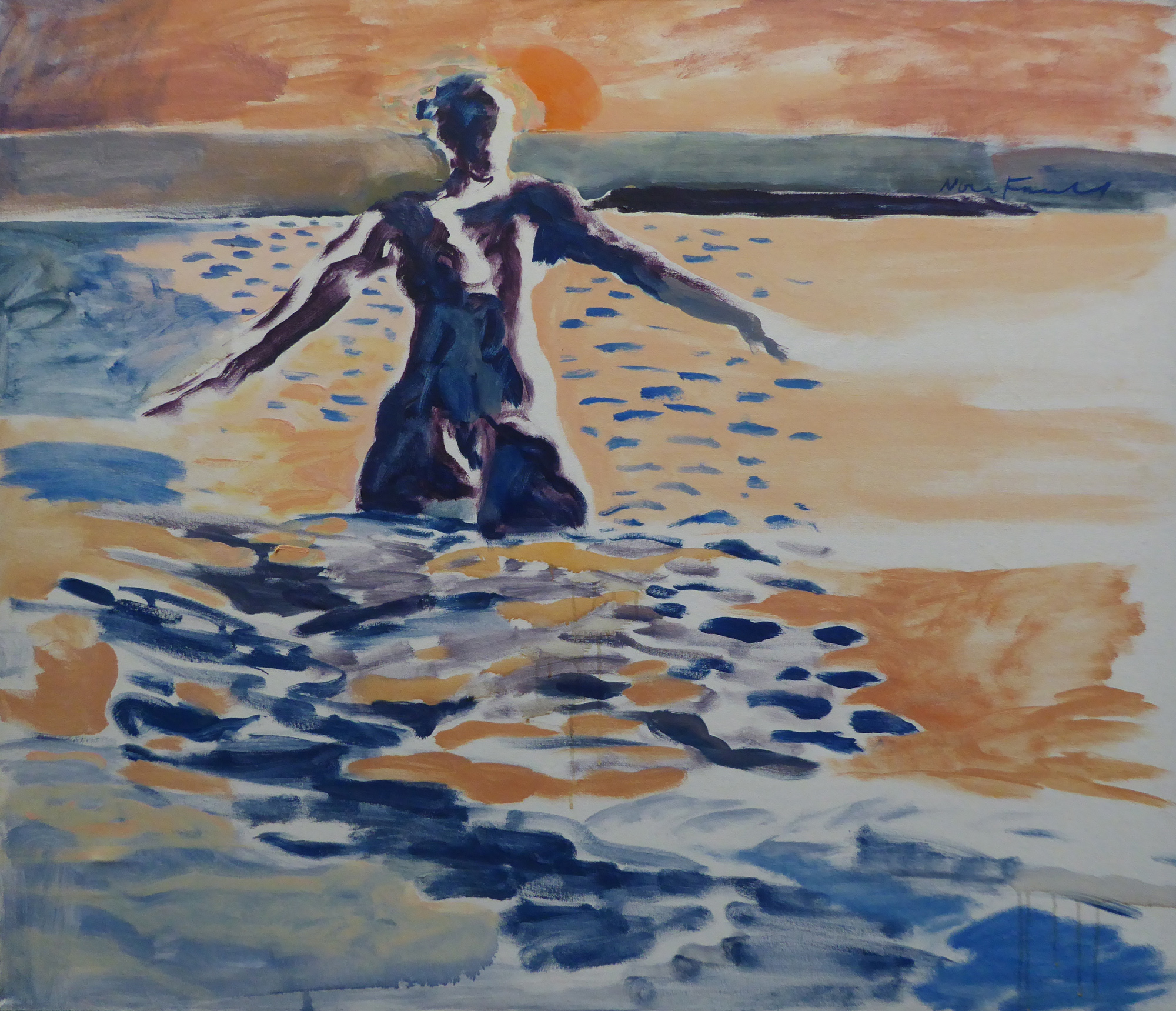 1985 רוחצת